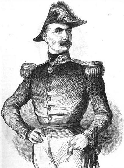 Le général Négrier.